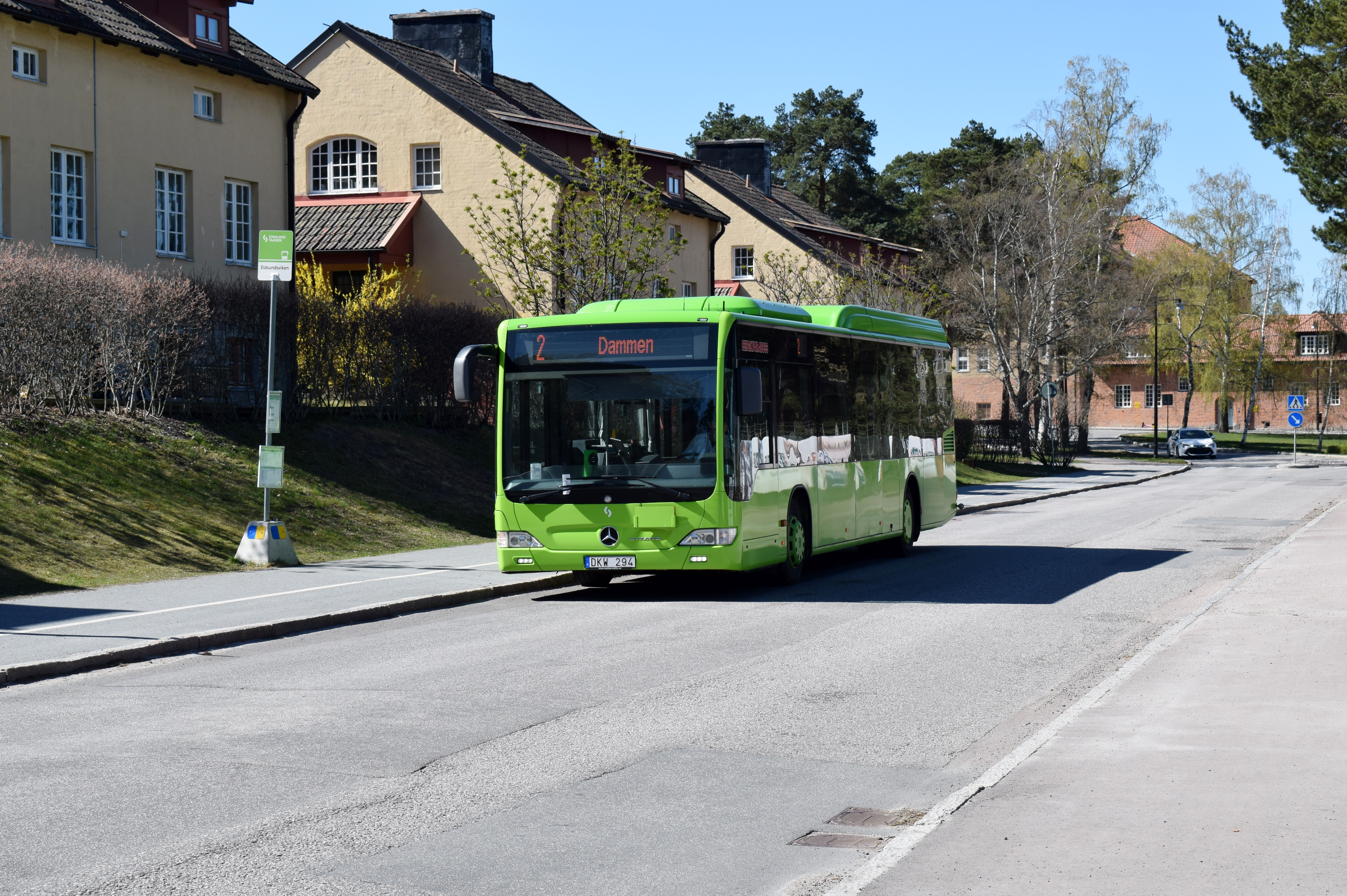 Busslinje 2 mot Dammen vid hållplatsen Eldsundsviken i Strängnäs.